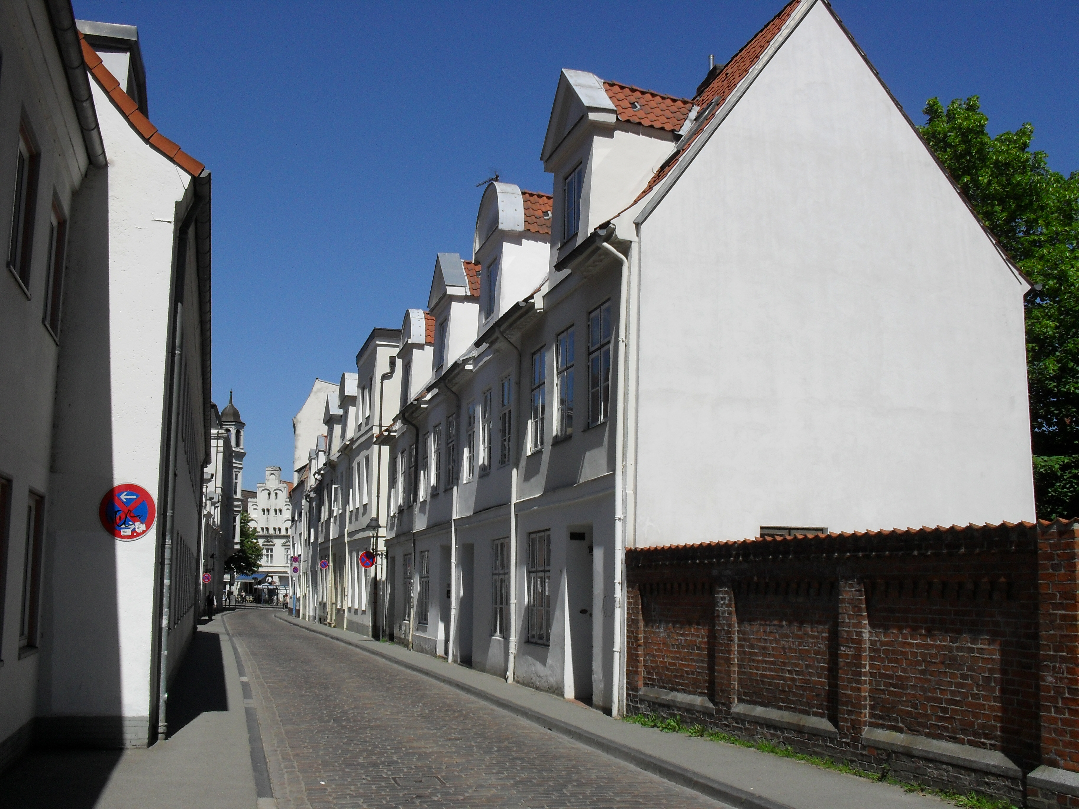 Das Fegefeuer in Lübeck